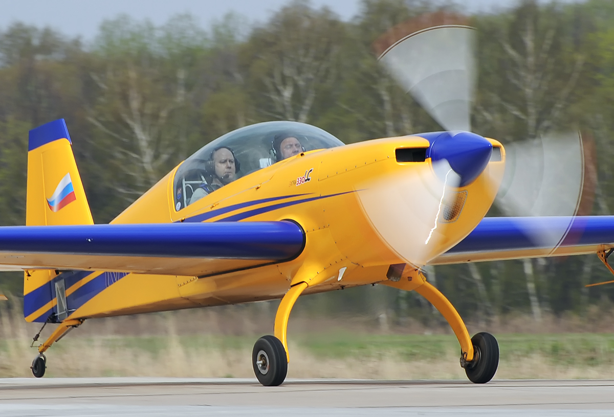 Extra 330LC RA-0330G